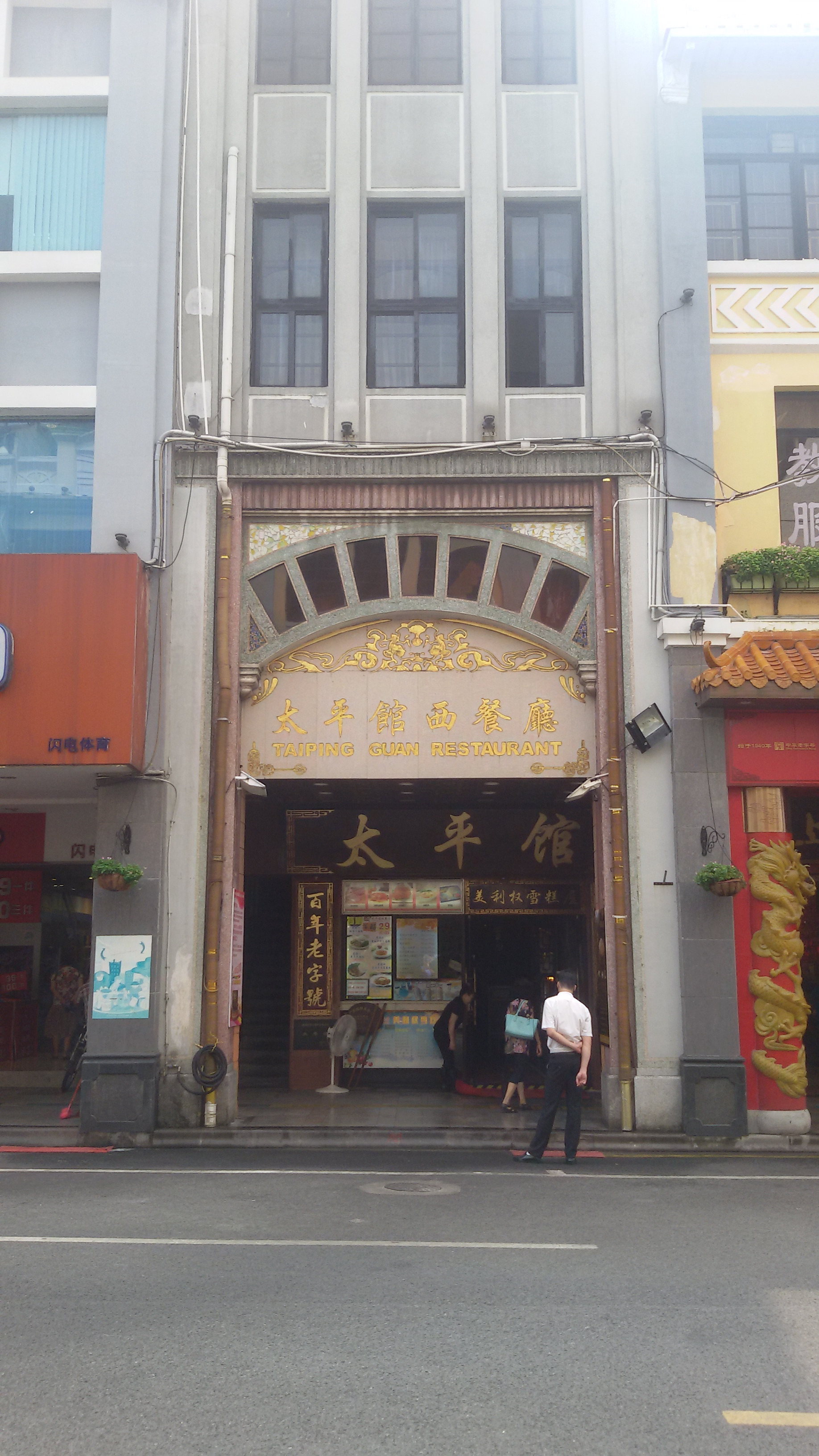 粵語: 太平館西餐廳